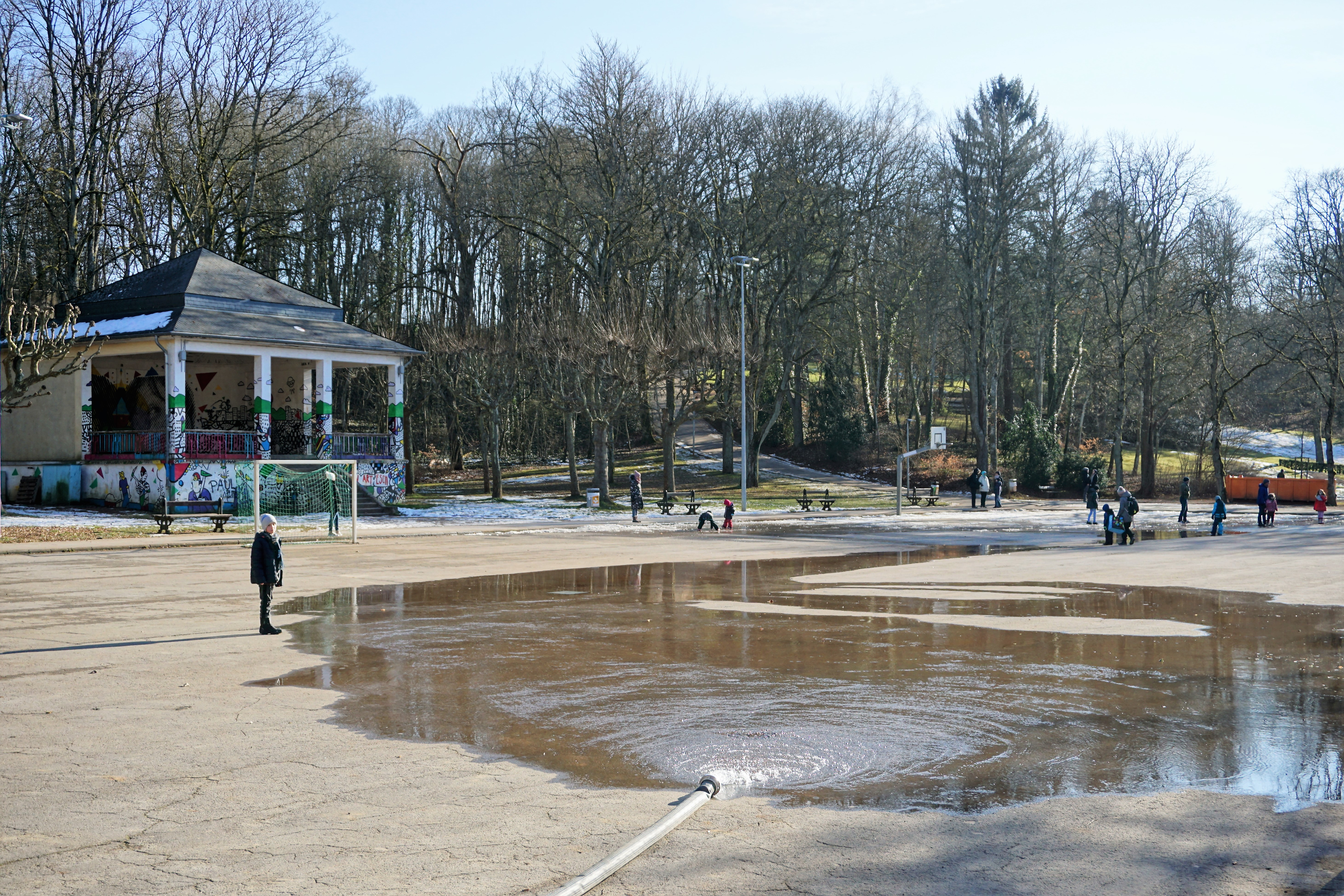 Esch-Alzette, Parc municipal Gaalgebierg. Préparatioin de la patinoire naturelle.)